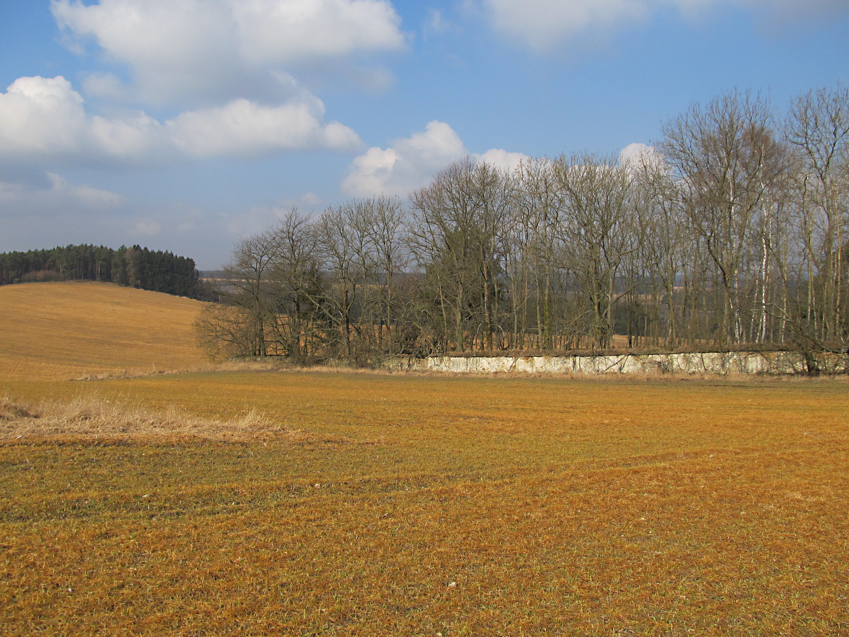 Telice 01 ŽH